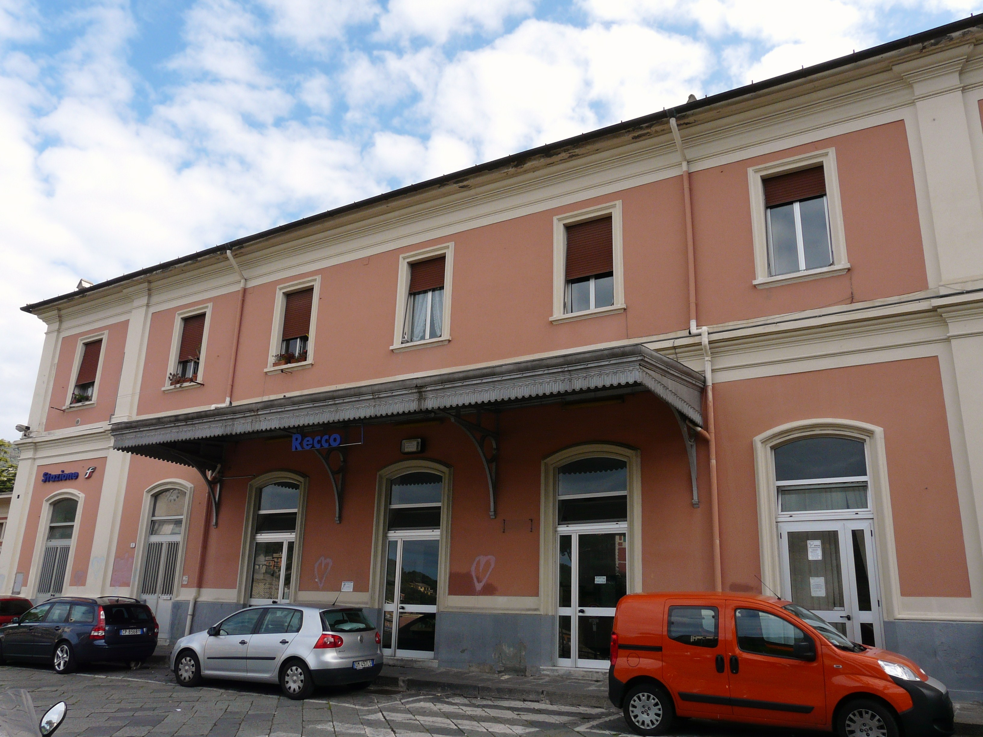 Stazione ferroviaria di Recco, Liguria, Italia